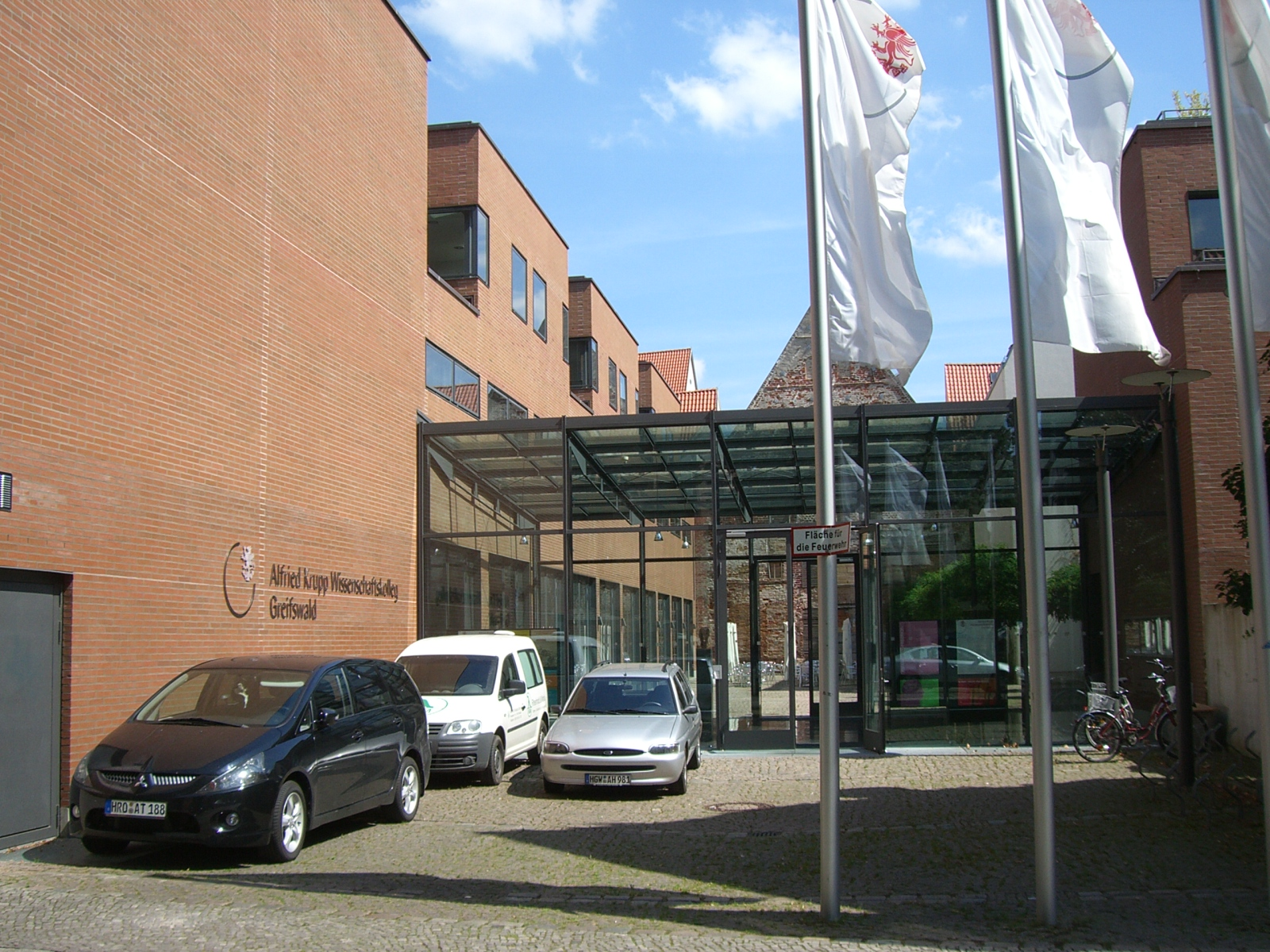 Greifswald